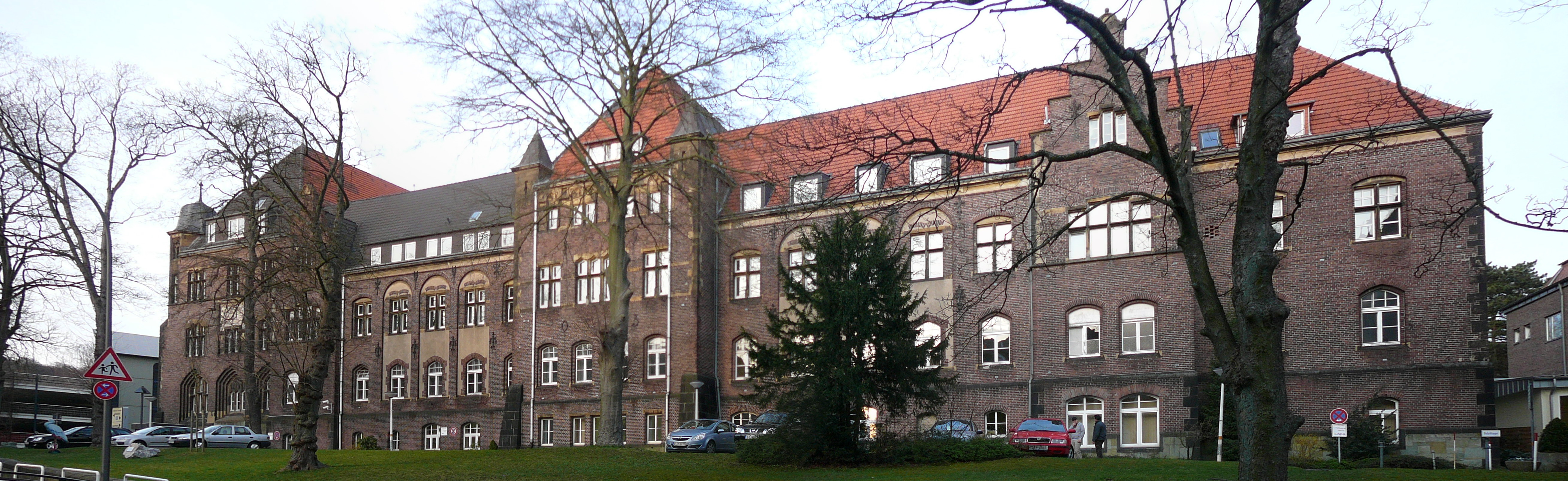 Vogelsangstr, Wuppertal